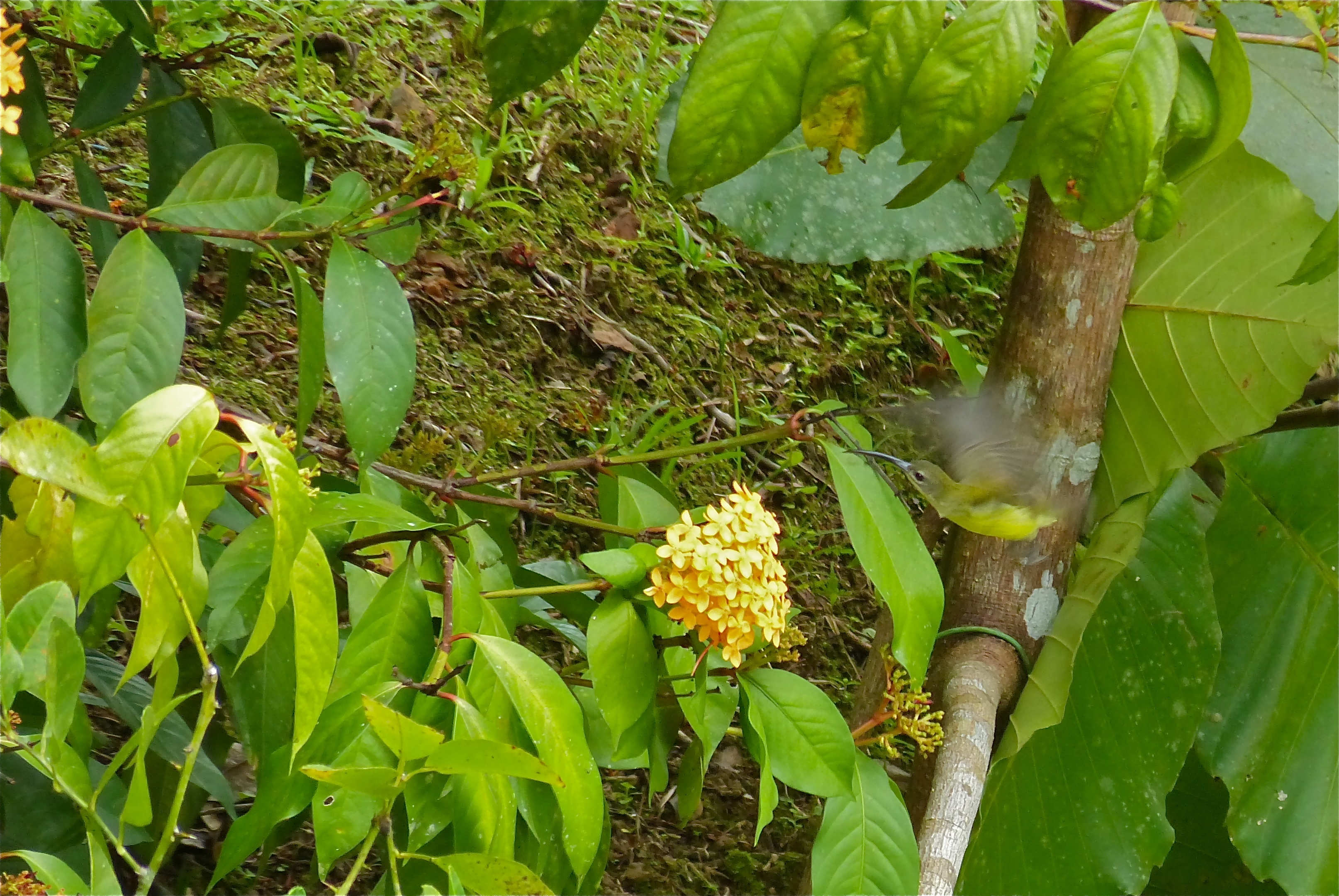 Sepilok, Sabah, MALAYSIA